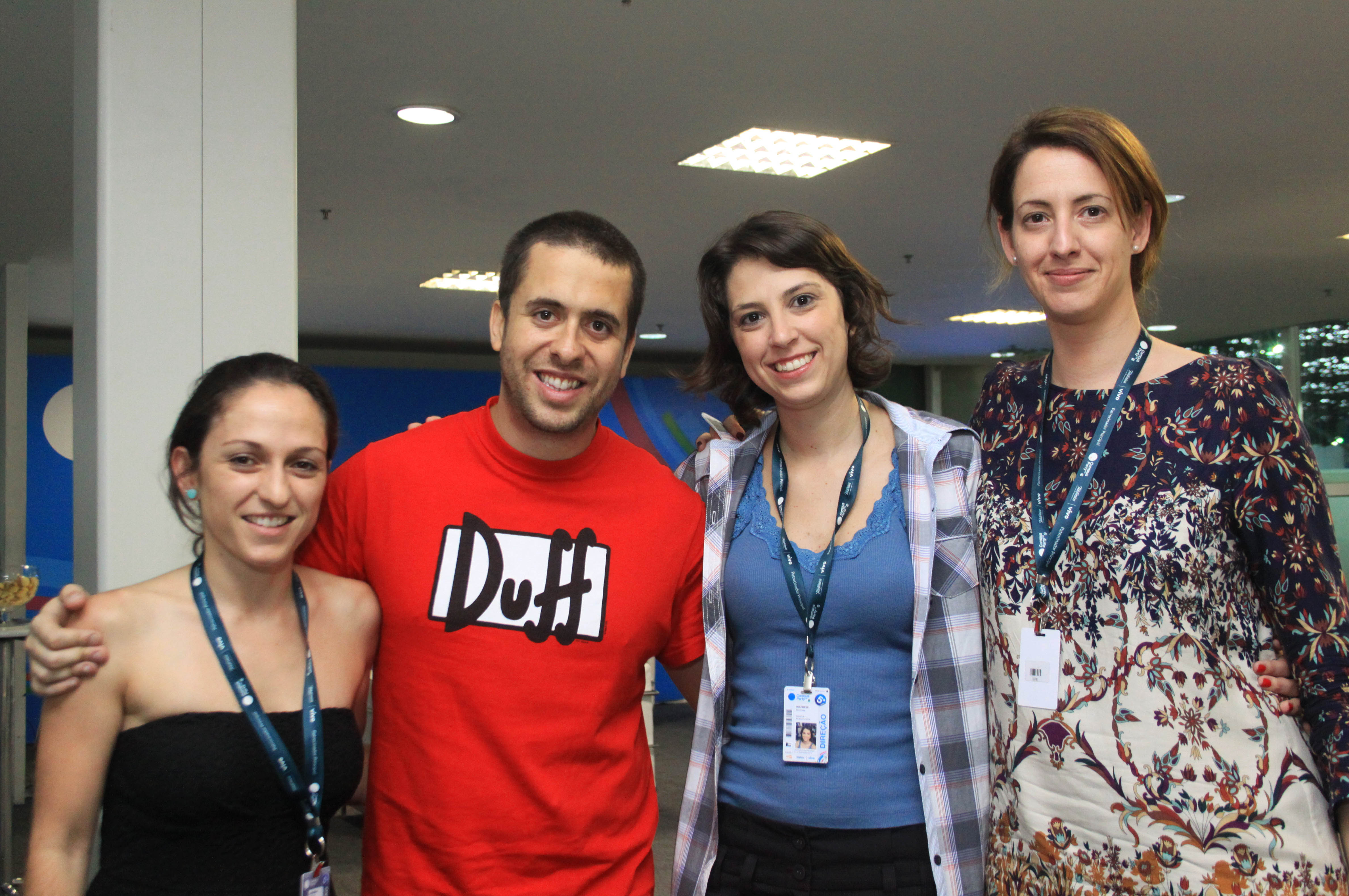 Fernanda Boscaini, Daniela Costa e Sonia Sanchez-Gomez da Futura Networks recebem Maurício Meirelles, novo repórter do CQC - 08/02/2012 - Camila Cunha.